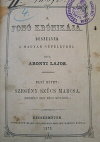 A fonó krónikája. Beszélyek Abonyi Lajos műve. Háromkötetes elbeszélésgyűjtemény. 1872-ben Kecskeméten a Szilády Nyomda kiadásában jelent meg.